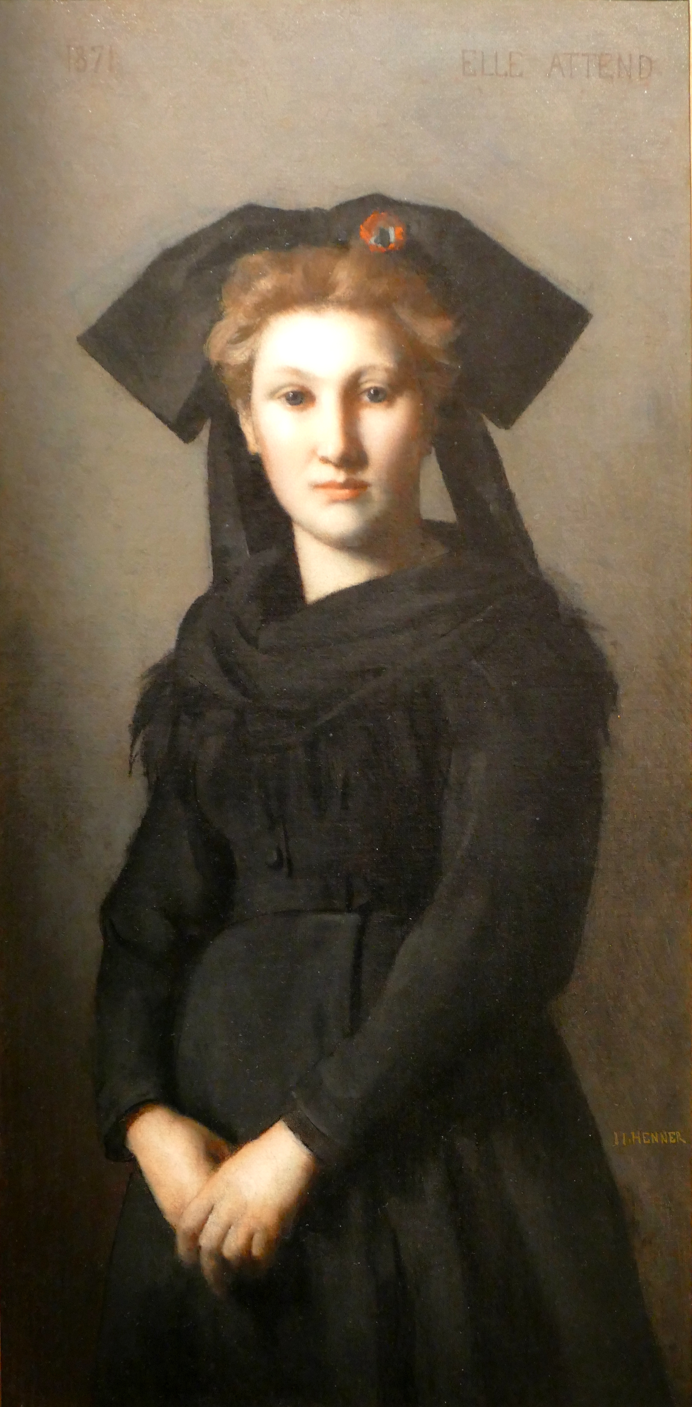 Elle attend, huile sur toile par Jean-Jacques Henner, 1871. Hauteur 60 cm - Largeur 30 cm. Musée de l'Armée : Exposition France-Allemagnes(s), 1870-1871, La guerre, la Commune, les mémoires. 13 avril-30 juillet 2017. Prêt du Musée National Jean-Jacques Henner, Paris.